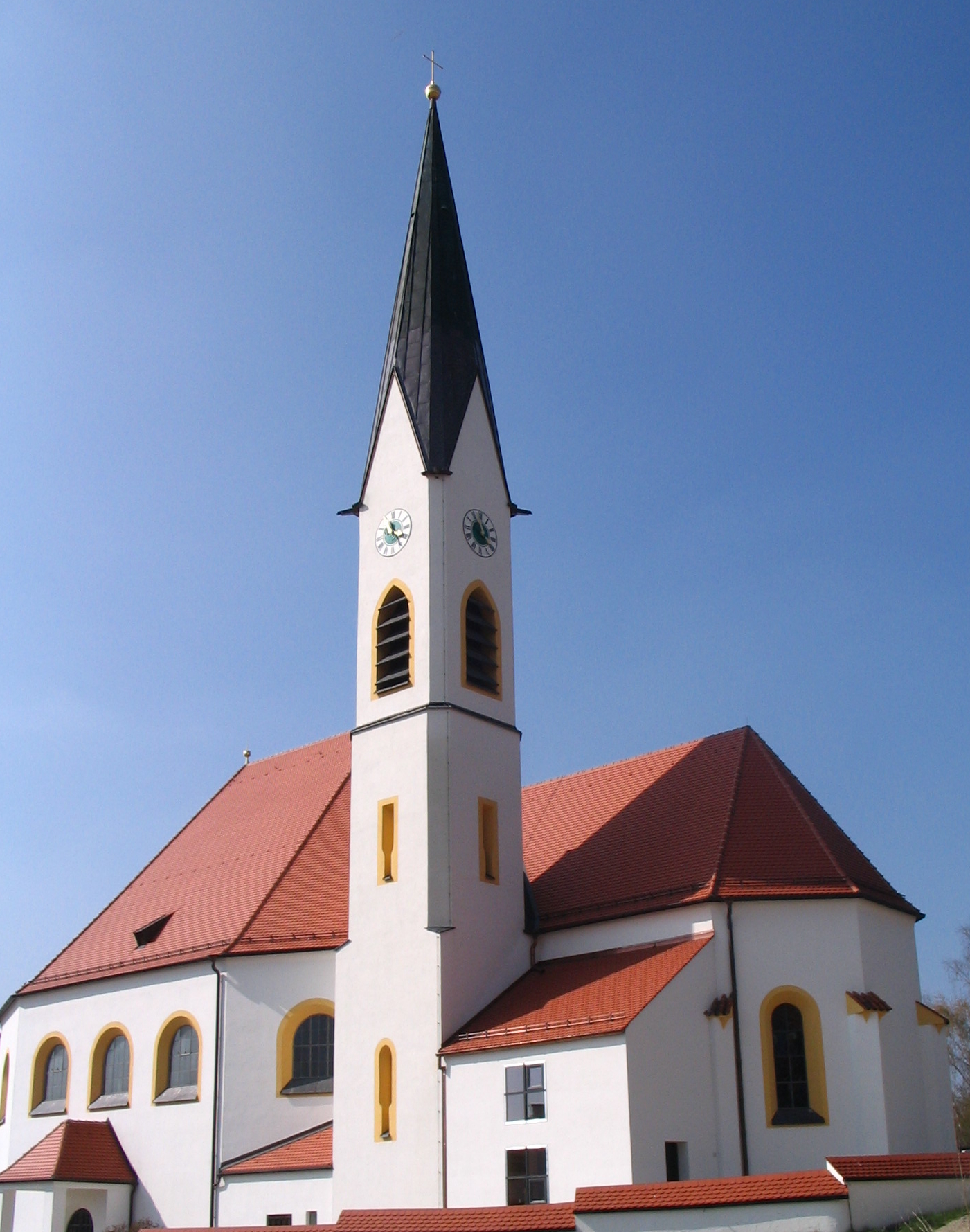 Pfarrkirche St. Leonhard in Aiglsbach, Landkreis Kelheim, Niederbayern